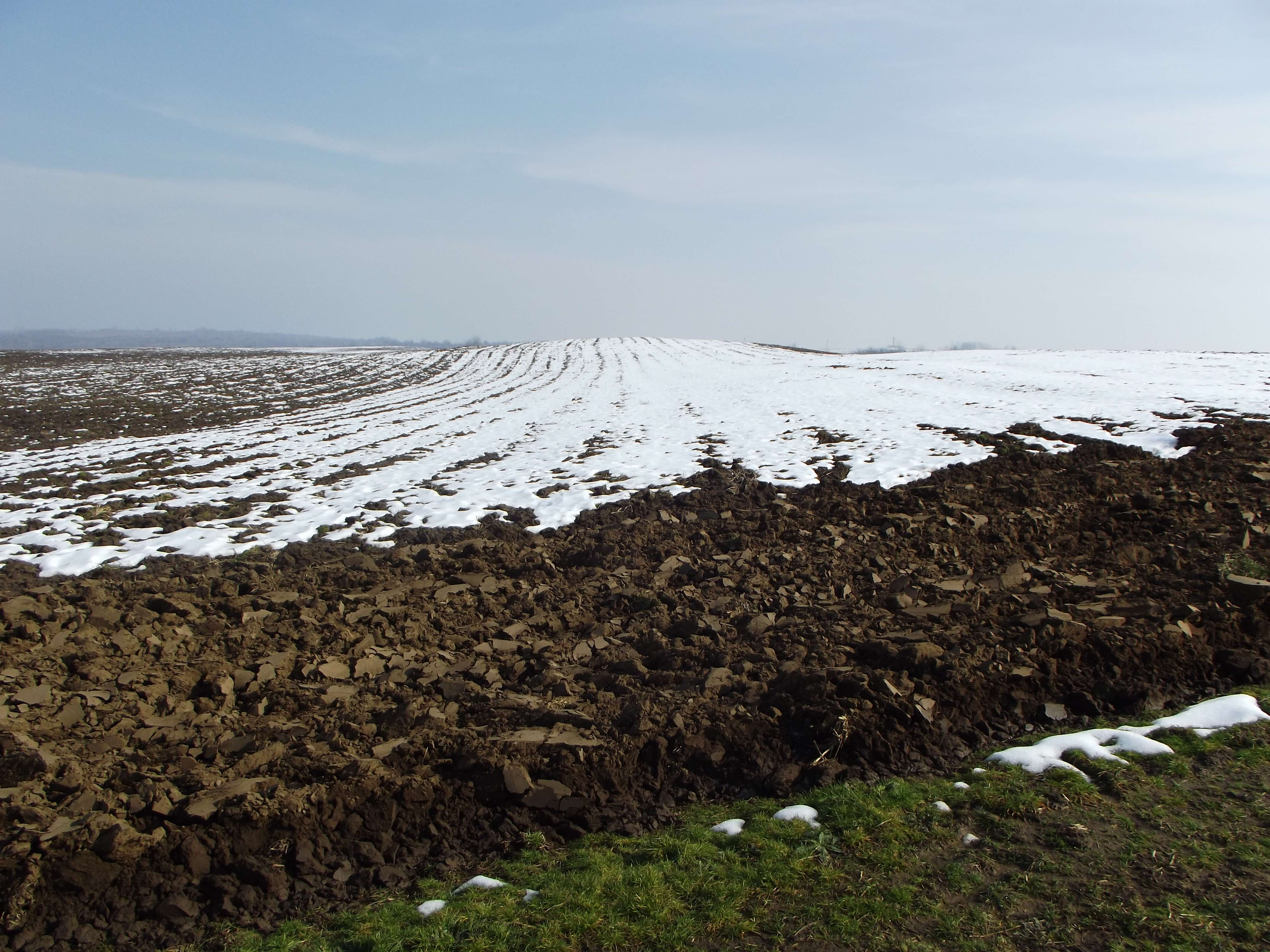 Оран в местността Язвина, Ново село, Видинско